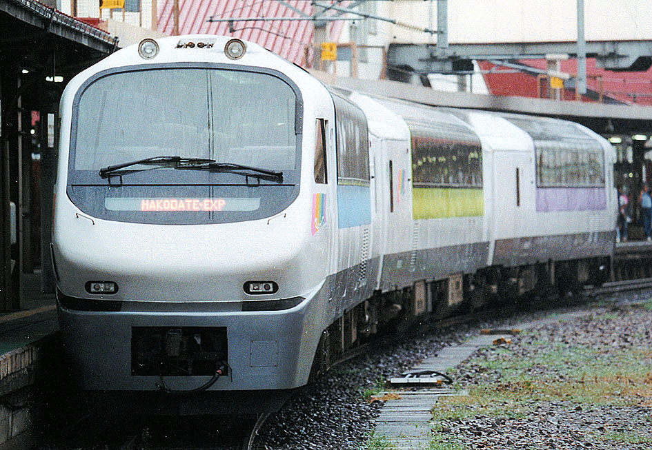 JR北海道 キハ183系ノースレインボーエクスプレス「はこだてエクスプレス」